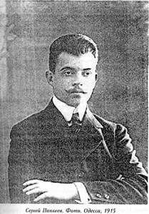 фотография Сергея Константиновича Панкеева